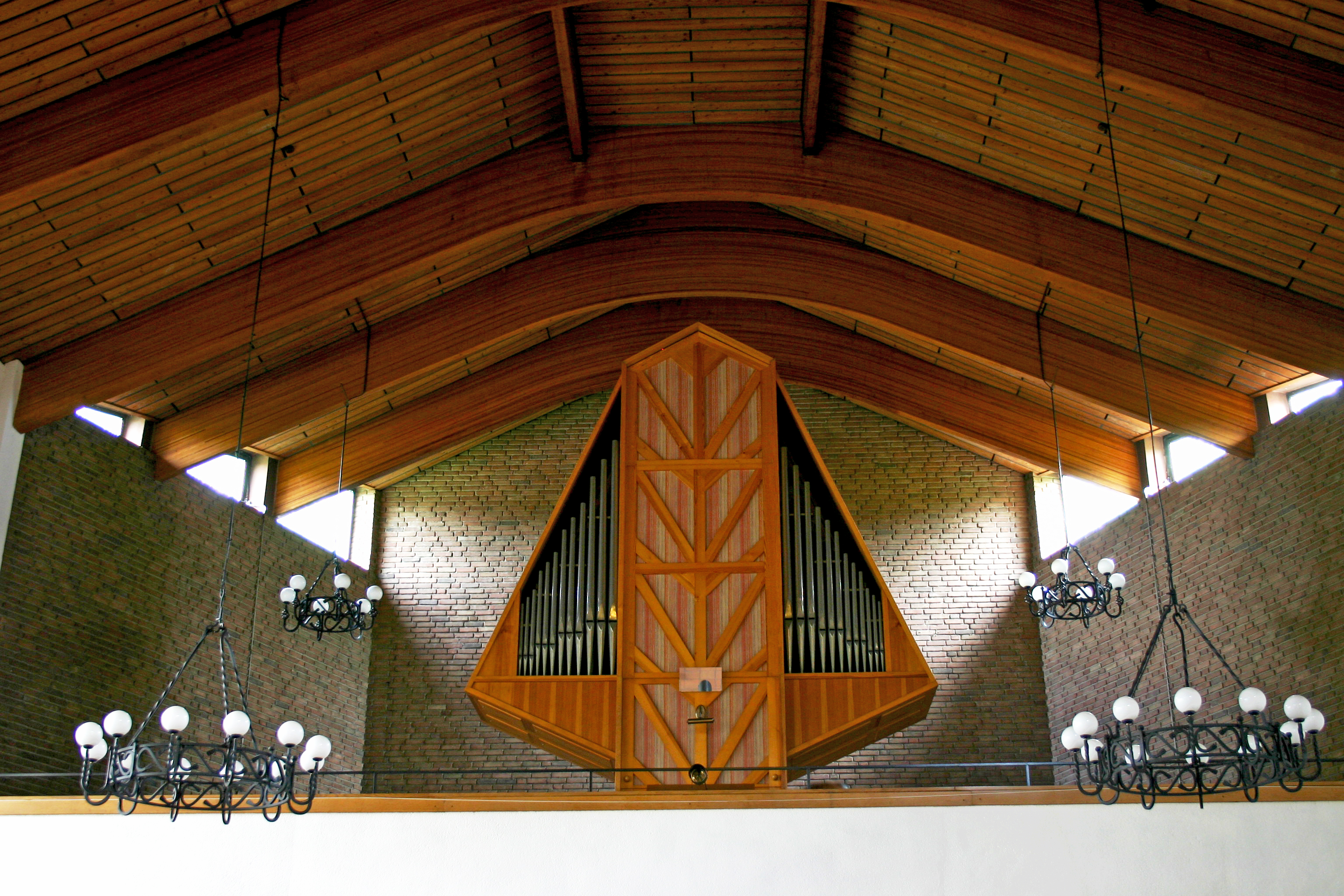 Orgelprospekt der kath. Kirche St.Johannes der Täufer in Loxstedt, Kreis Cuxhaven